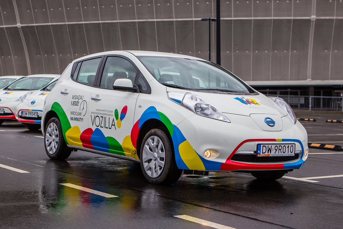 Jeden z samochodów VOZILLI jadący obok Stadionu Miejskiego we Wrocławiu.